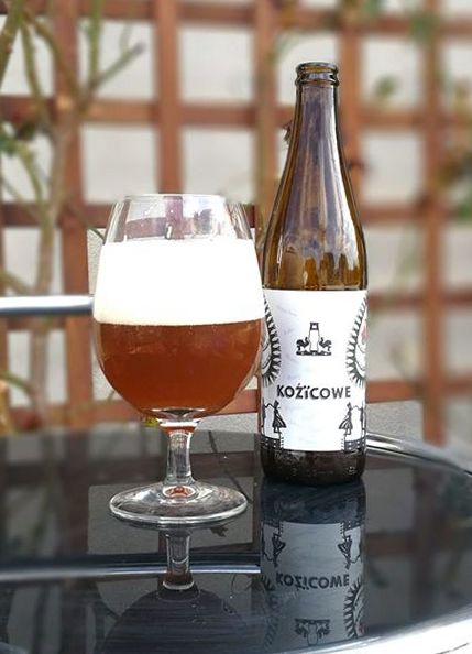 Kozicowe Beer of Poland